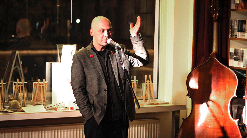 Autor und Sprecher Thomas Manegold während eines Auftritts im Periplaneta Literaturcafé Berlin 2013